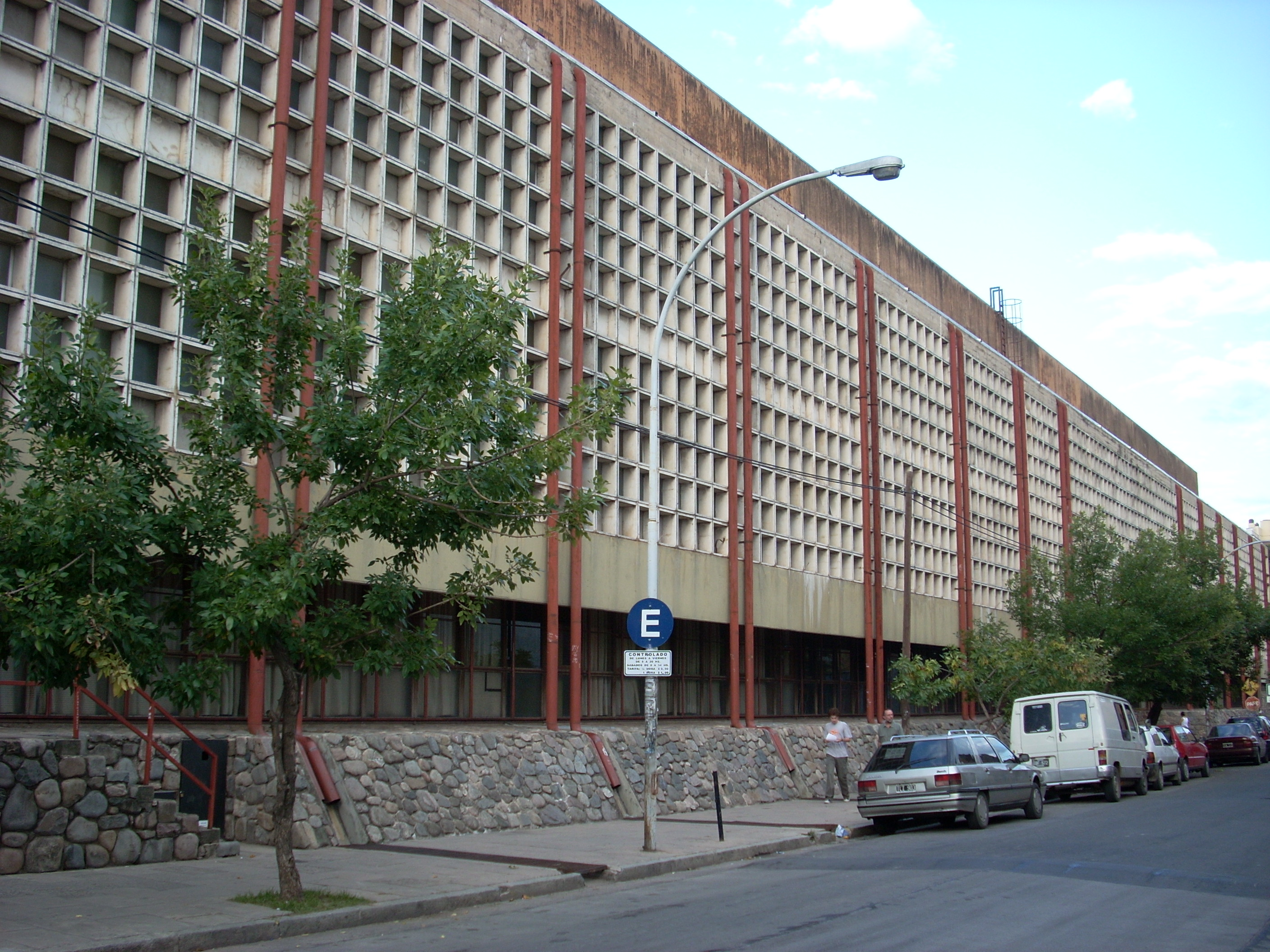 Escuela Superior de Comercio Manuel Belgrano, Barrio Alberdi, Córdoba, Argentina